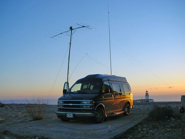 Amateurfunkimpression: Meteorscatter auf 144 MHz